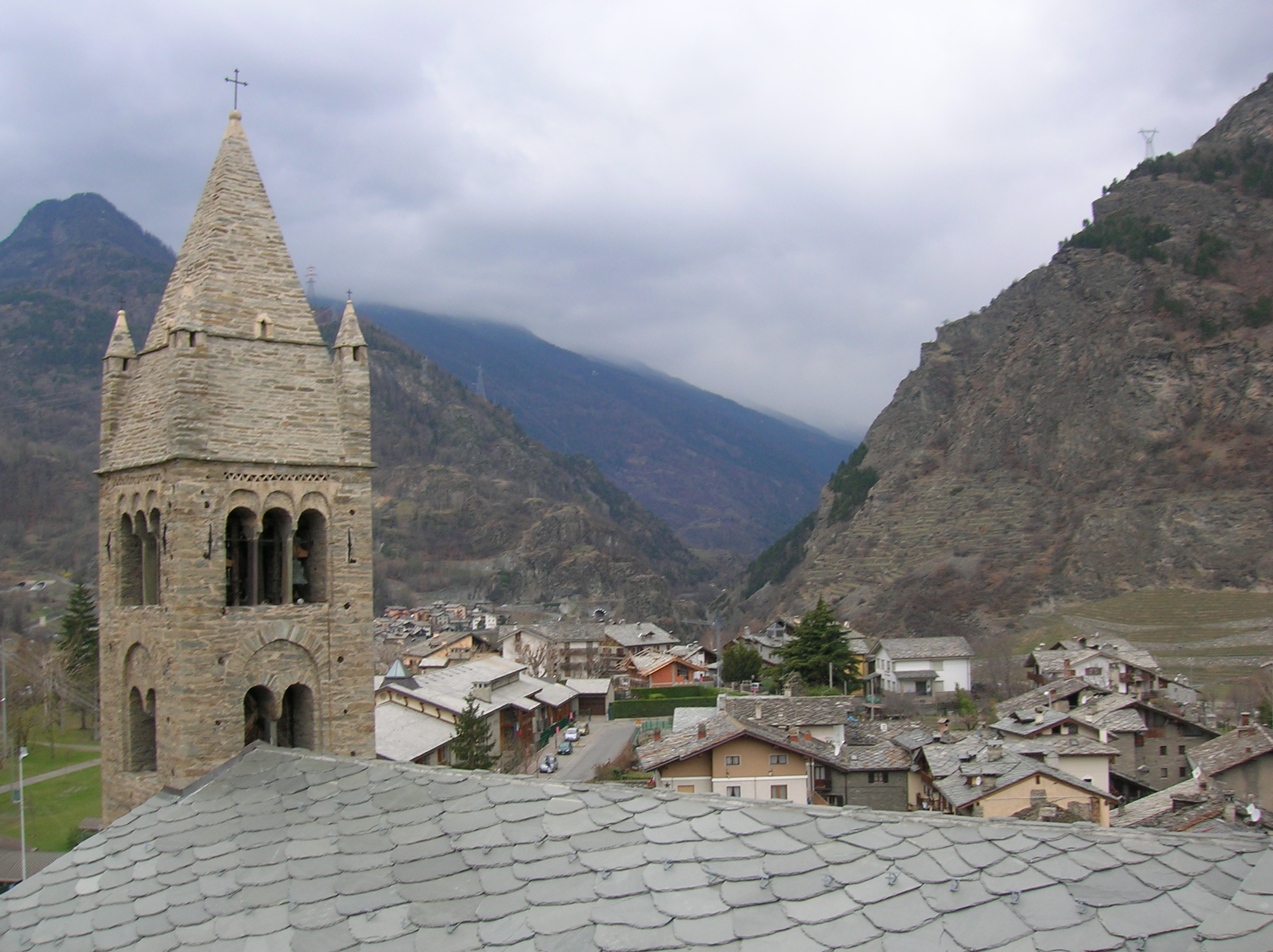 Arvier chiesa e panorama. Valle d'Aosta, Italia.